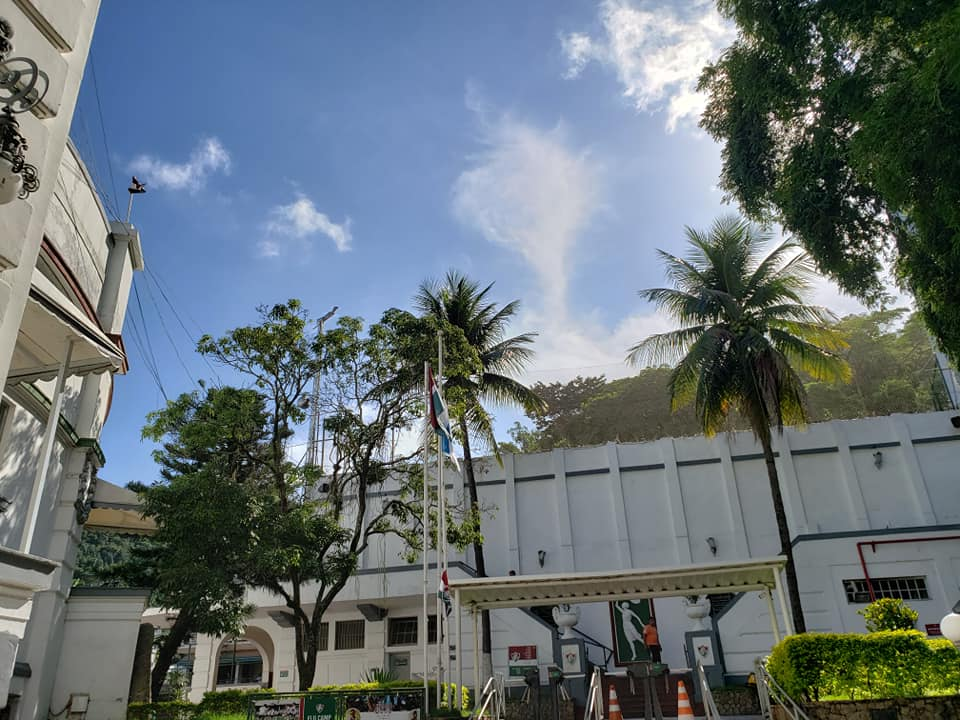 Aspecto interno da sede do Fluminense Football Club.